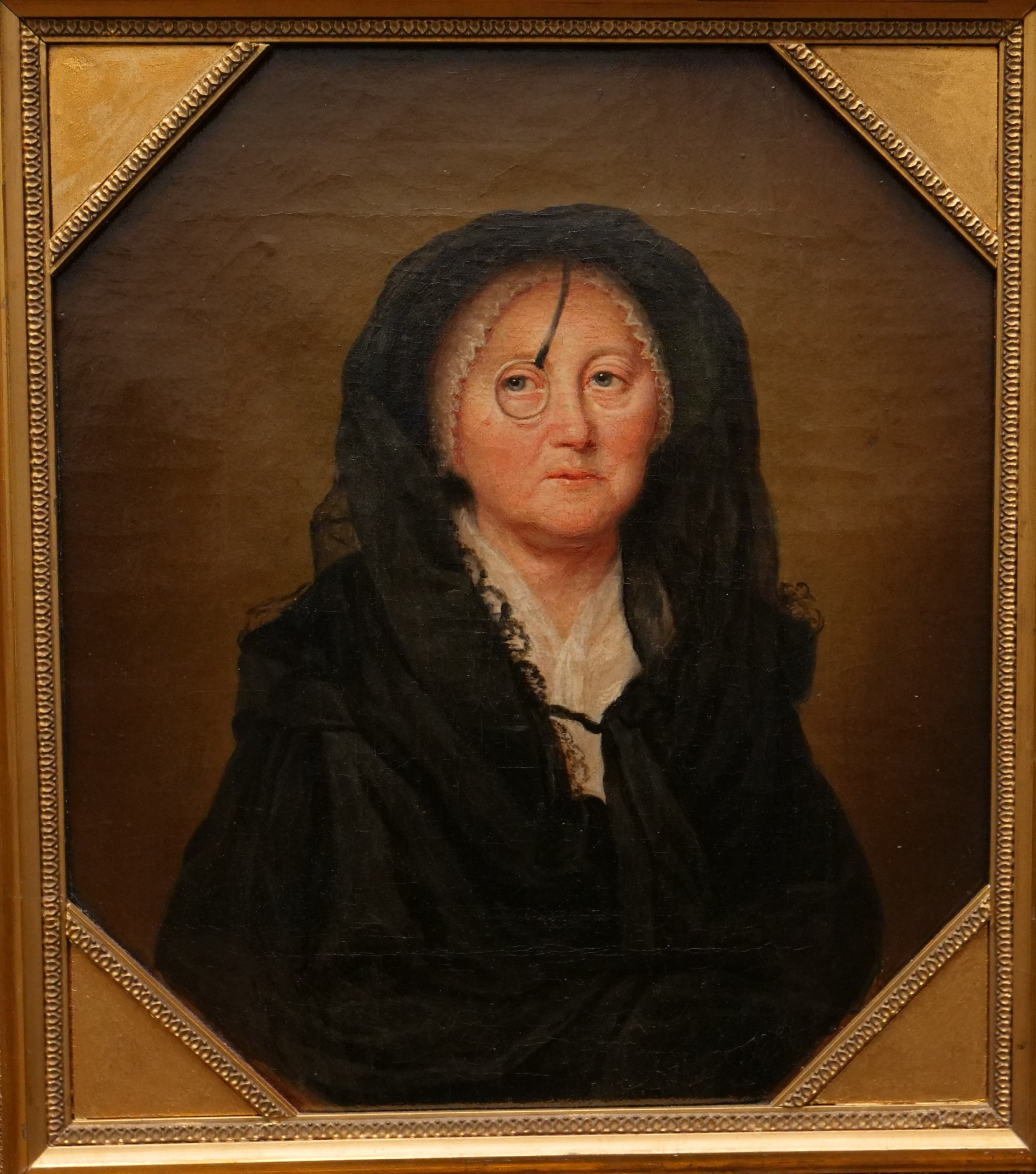 Anna Dorothea Therbusch, Selbstbildnis um 1780, Gemälde Öl auf Leinwand, Alte Nationalgalerie